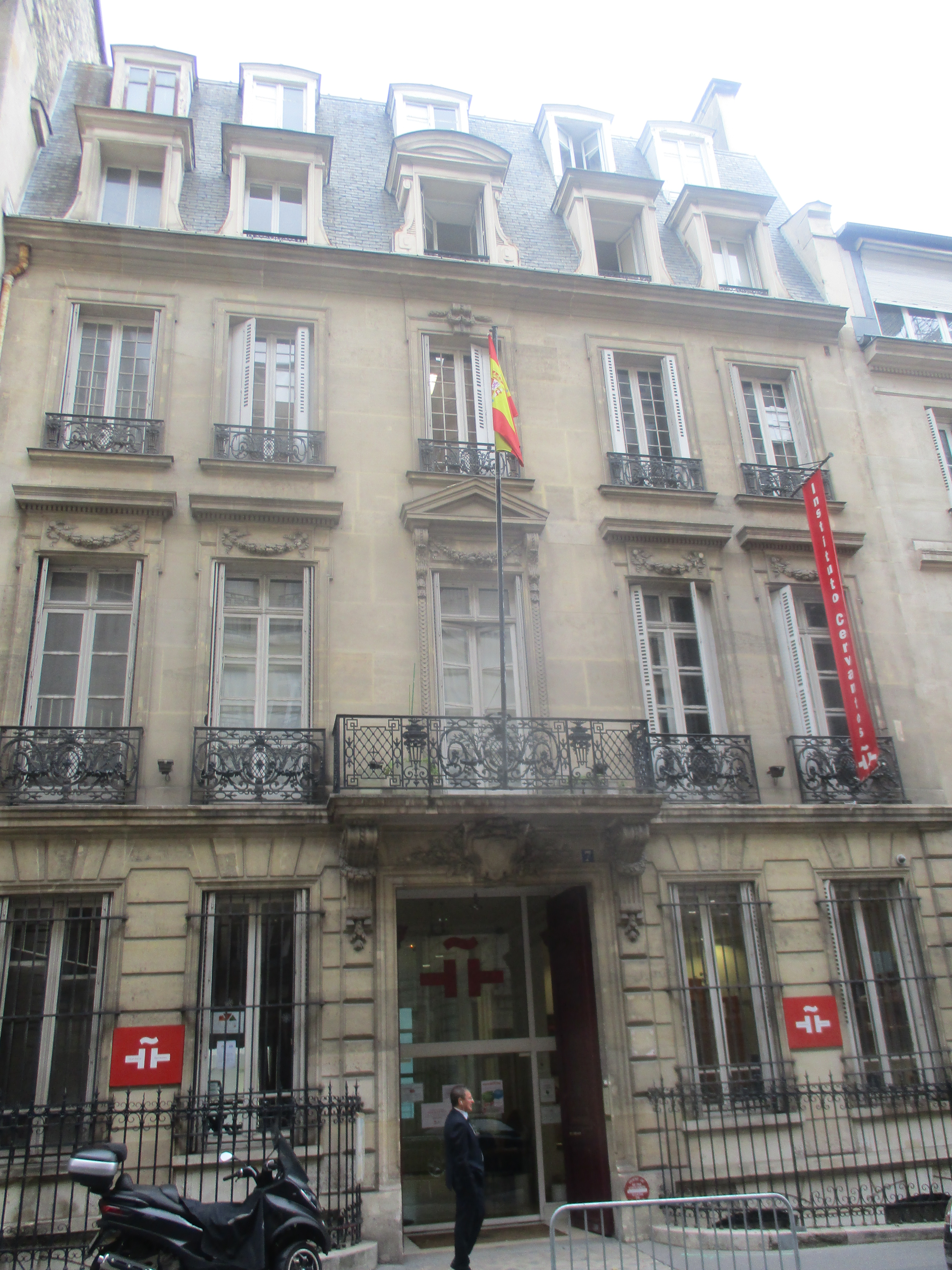 Institut Cervantes au 7 rue Quentin-Bauchart, Paris VIIIe.